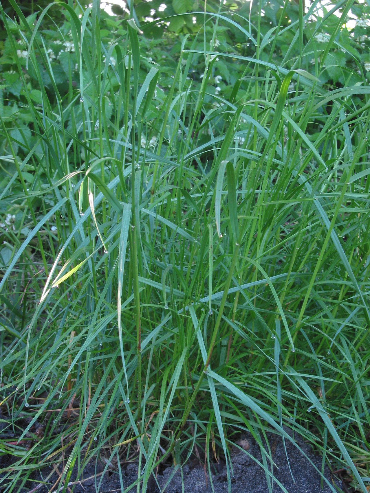 Lolium perenne flower emerging (Engels raaigras )